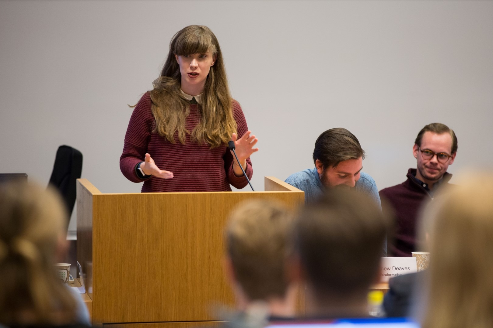 leiðtogaskólinn